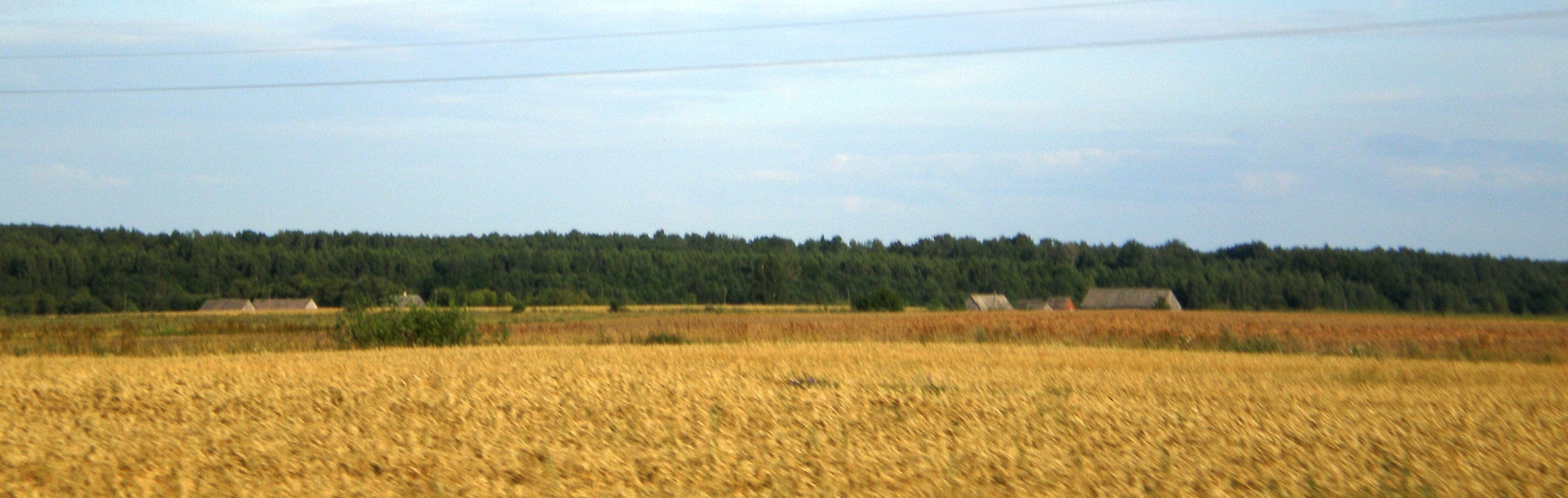 Šaravai, Josvainių sen., Kėdainių raj.